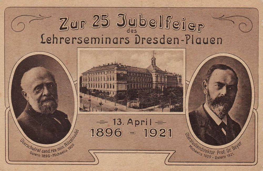 Zur 25 Jubelfeier des Leherseminars Dresden Plauen, 13. April, 1896-1921, Oberschulrat cand. rev. min. Nietzelnadel, Ostern 1896-Michaelis 1909, Oberstudiendirektor Prof. Dr. Beyer, Michaelis 1909-Ostern 1921